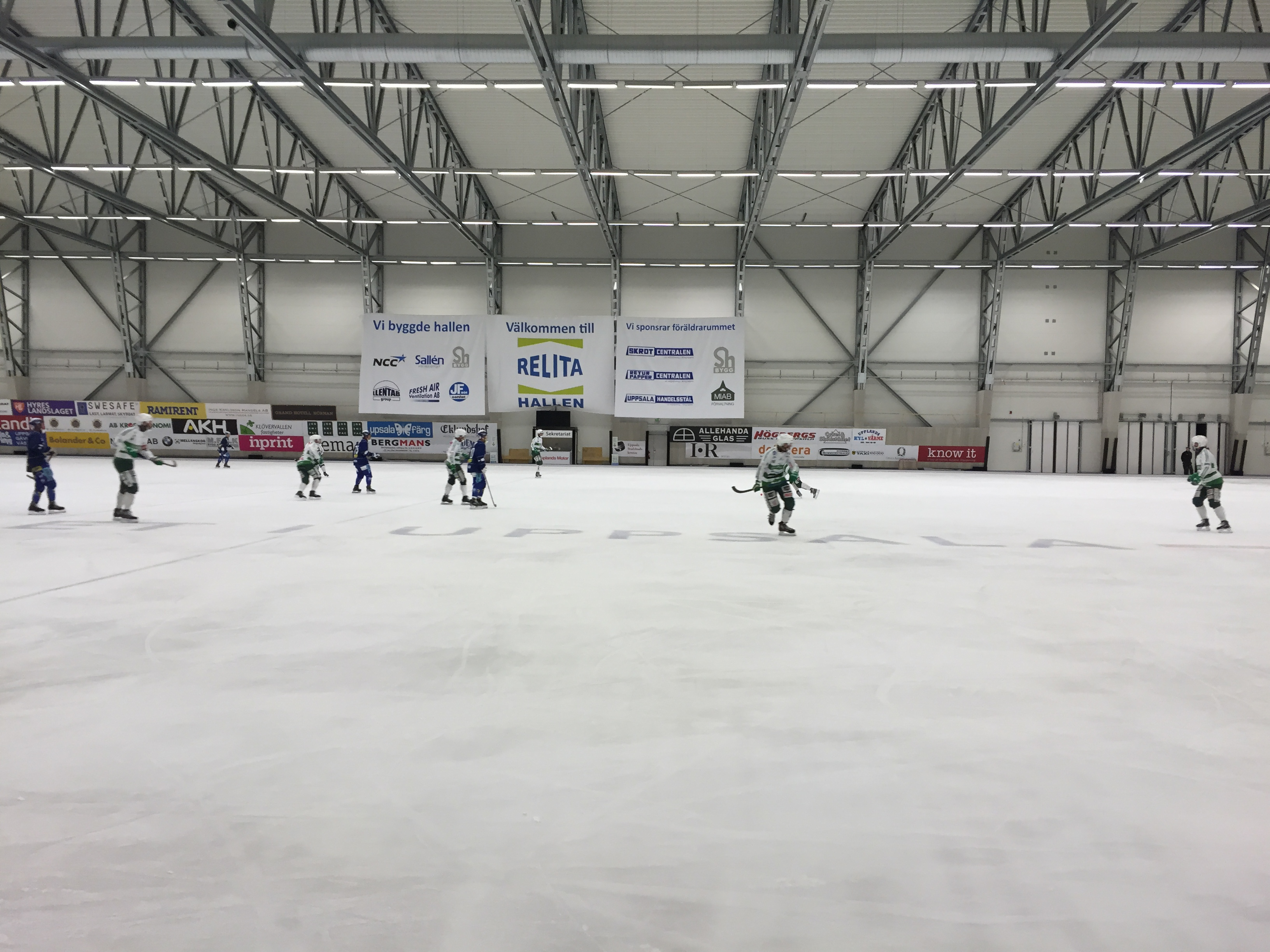 Relitahallen, Uppsala